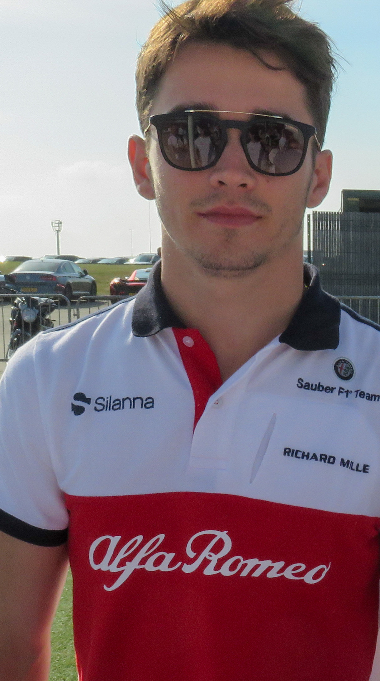 Charles Leclerc, in Gran Bretagna nel 2018, Alfa Romeo Sauber (Silverstone)